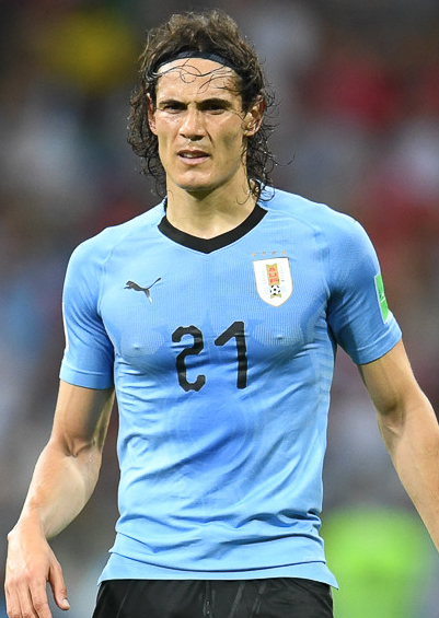 День, когда Роналду попрощался с ЧМ. Кавани и Суарес идут дальше